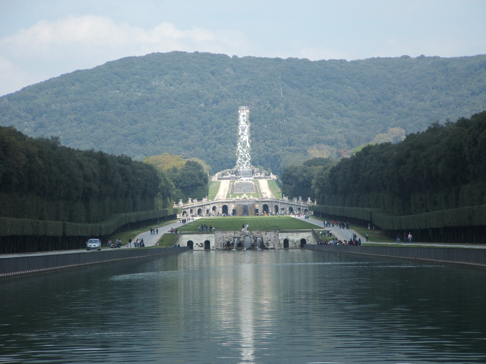 Immagine dalla Reggia di Caserta, Caserta, Campania, Italia. Il Parco